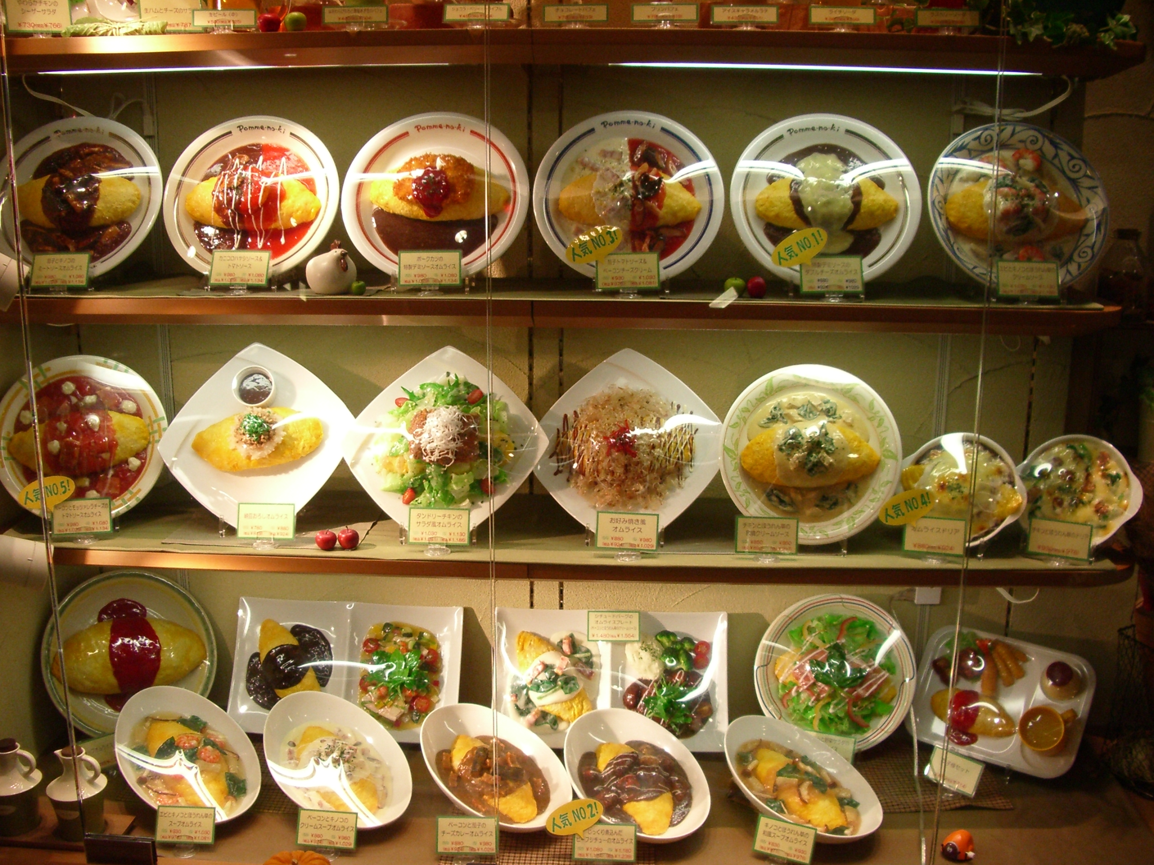 オムライスの食品サンプル。利用者に見易い様に斜めに陳列されるのが一般的である[17]。.party 055